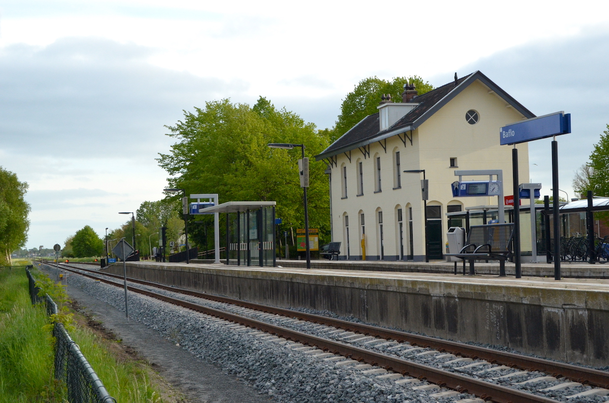 Het Station Baflo is het enige nog bestaande stationsgebouw langs de spoorlijn Sauwerd - Roodeschool. Foto: Erik Swierstra.